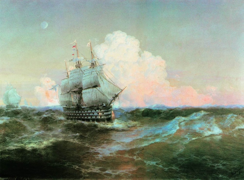 Корабль "Двенадцать апостолов". Картина И. К. Айвазовского, 1897 год. Холст, масло. 105x139 см.